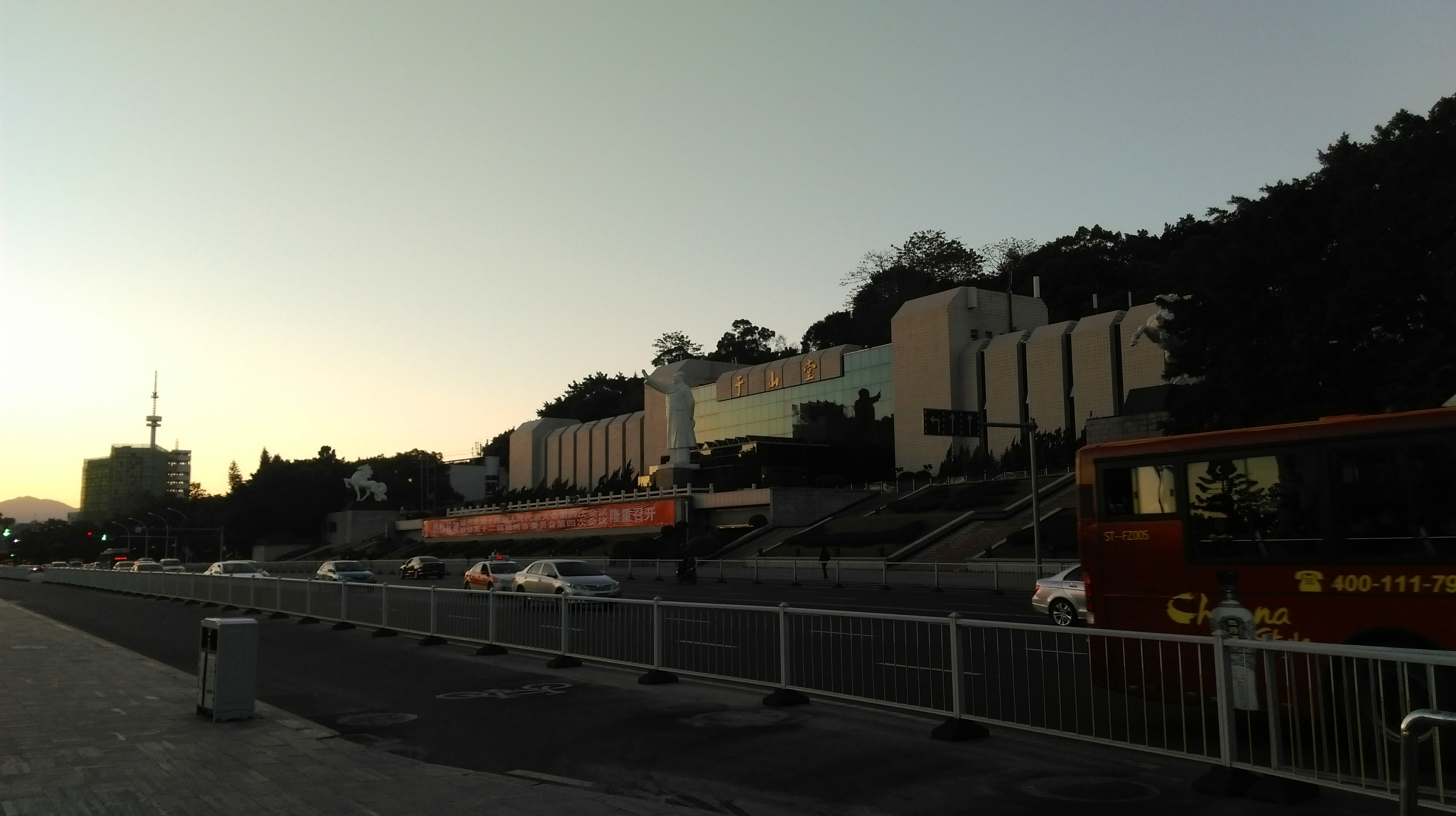 中文（中国大陆）: 福州五一广场的毛泽东雕像